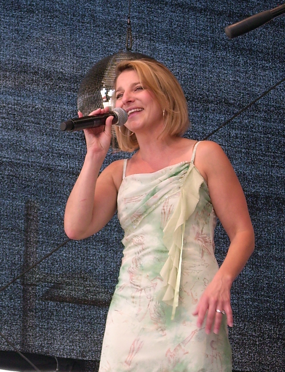 Die deutsche Sängerin Sandra Weiss bei einem Auftritt 2013.